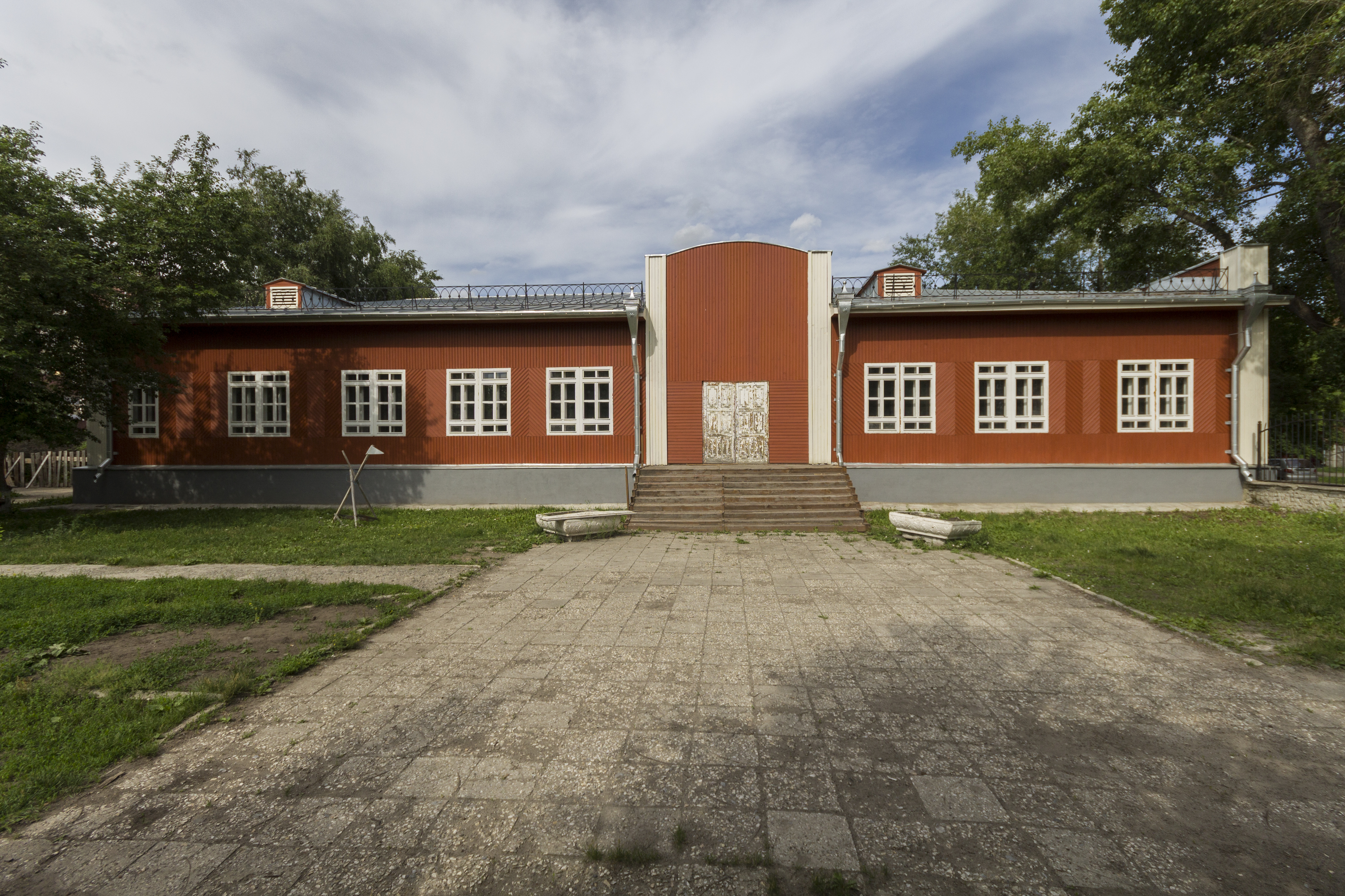 Дом декабриста А.Е.Розена, в дальнейшем здание Общественного собрания: улица Советская, 67, Курган, Курганская область